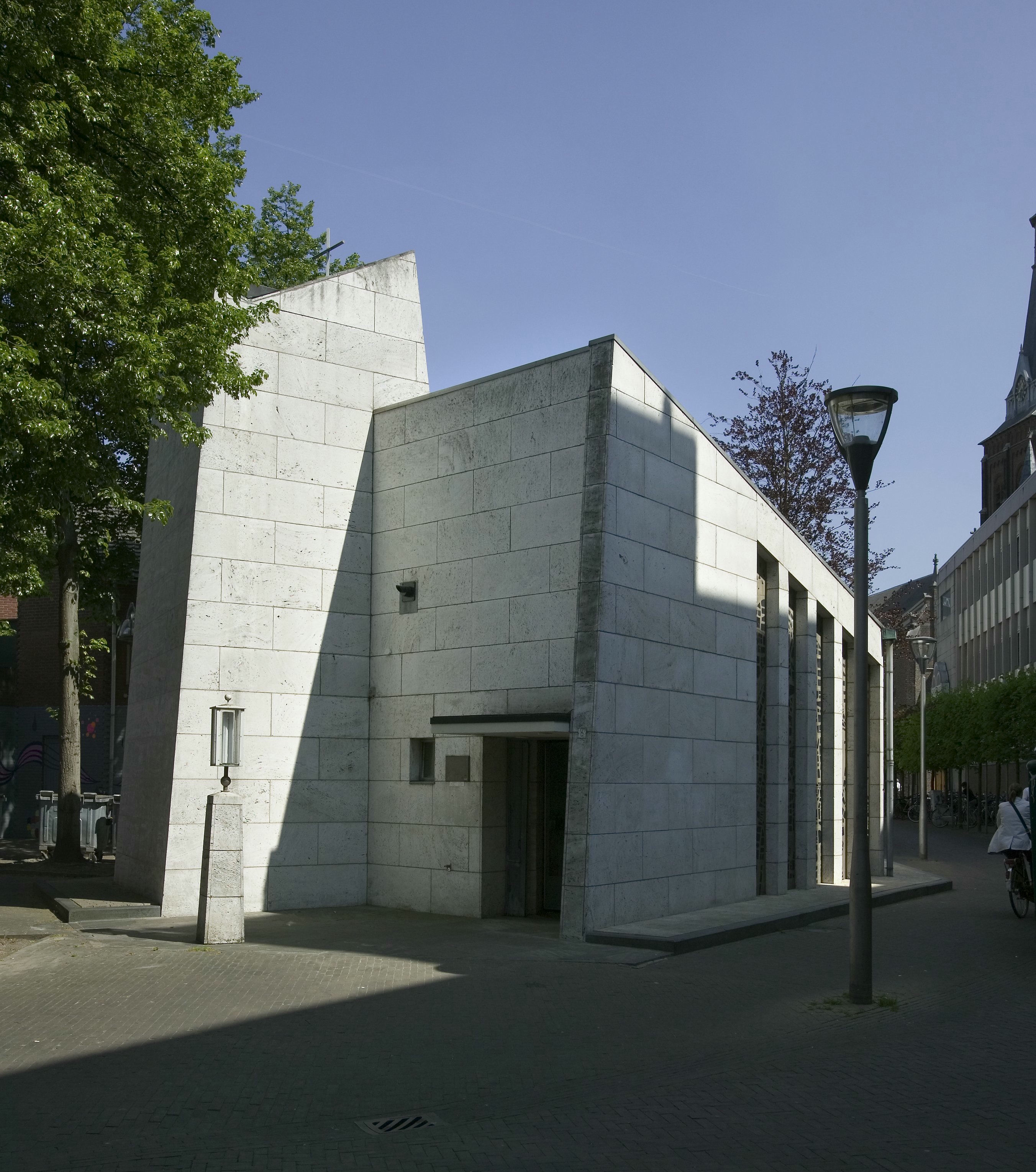 Kapel Onze Lieve Vrouw Ter Nood: Overzicht van de oostgevel